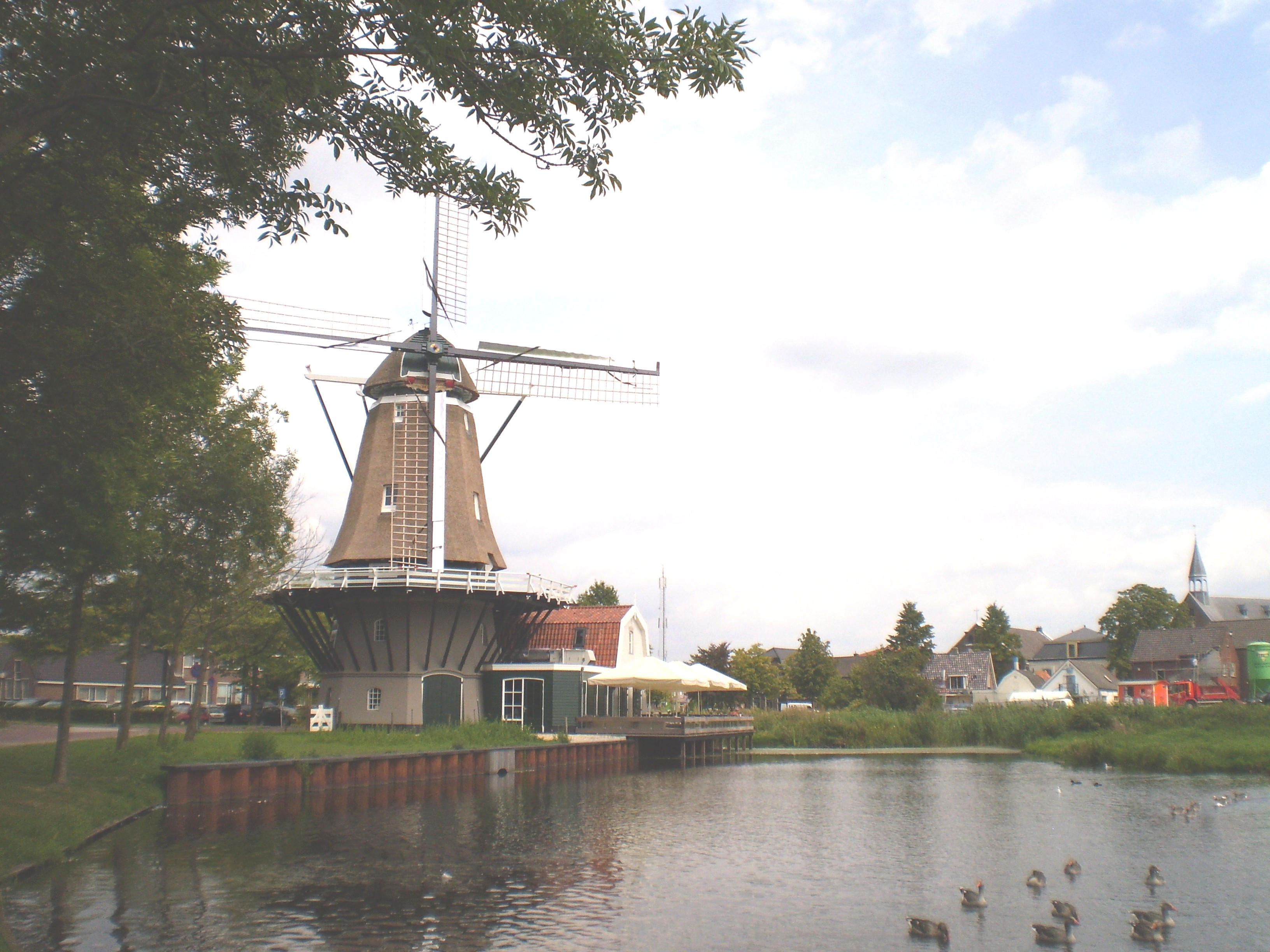 Mûne Bunschoten